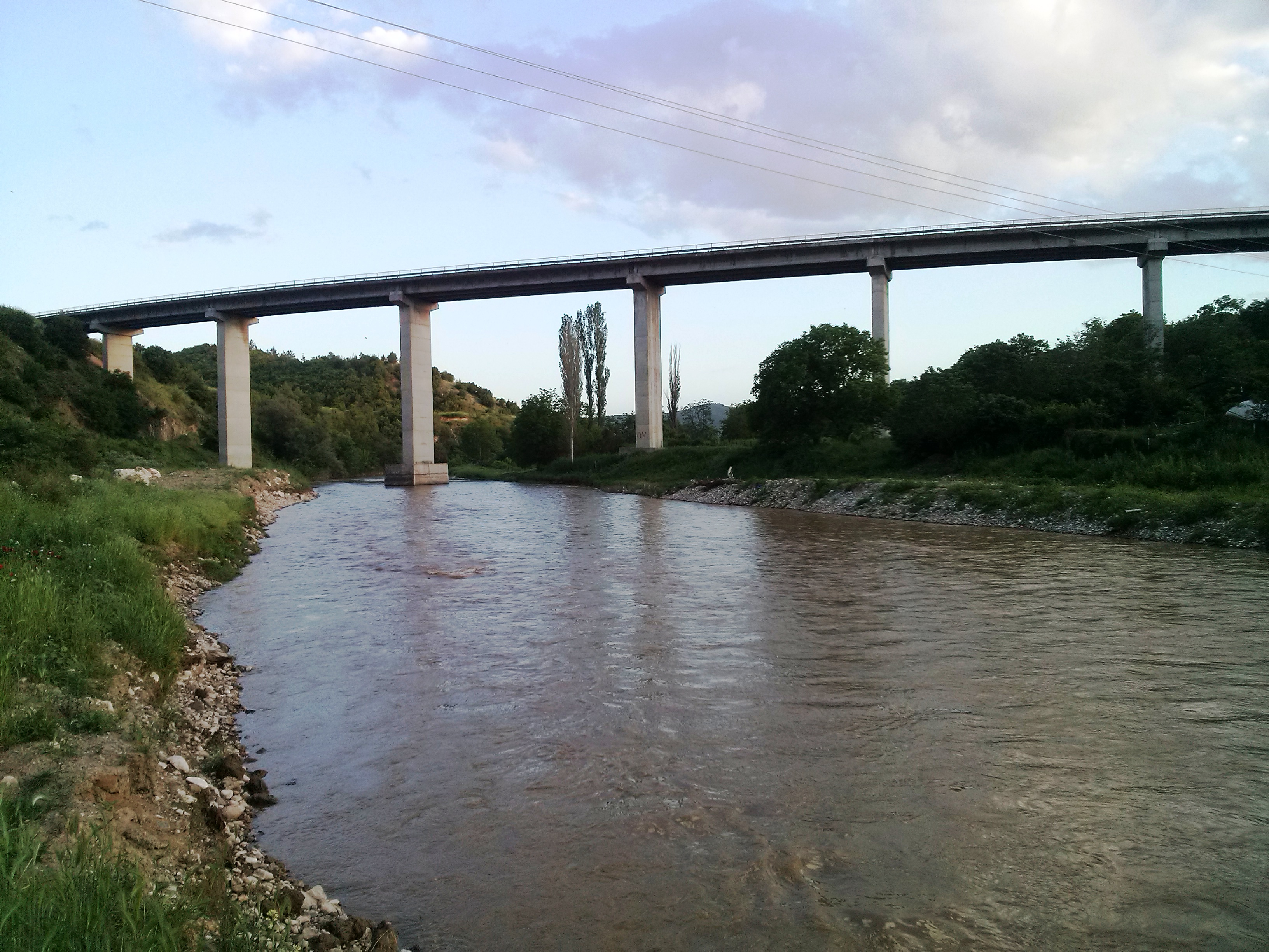 Реката Вардар и најголемиот мост на автопатот „Мајка Тереза“, кој го поврзува Велес со Скопје